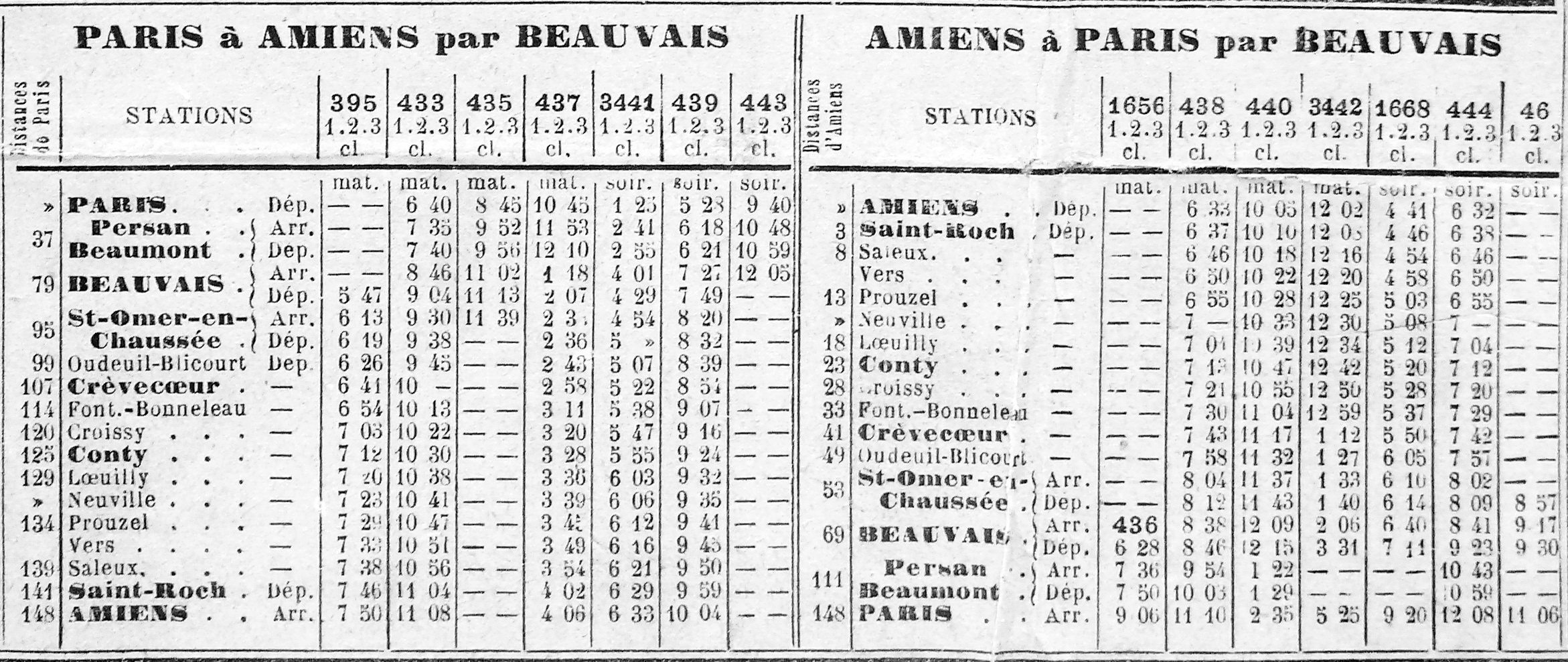 Extrait de l'affiche éditée en supplément du Le Courrier de la Somme : Horaires des trains du service d'hiver (novembre 1890) : Ligne Amiens - Beauvais - Paris